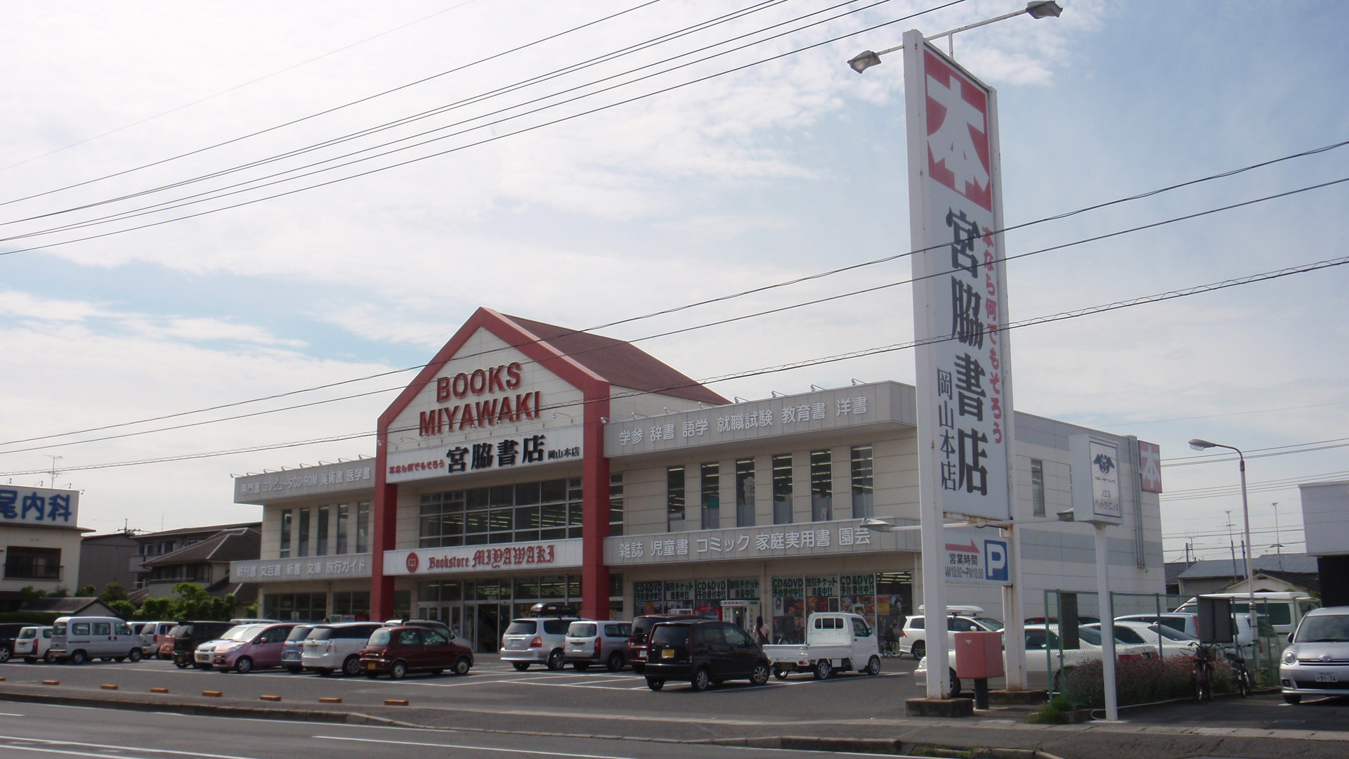 岡山県岡山市北区今三丁目にある宮脇書店岡山本店。